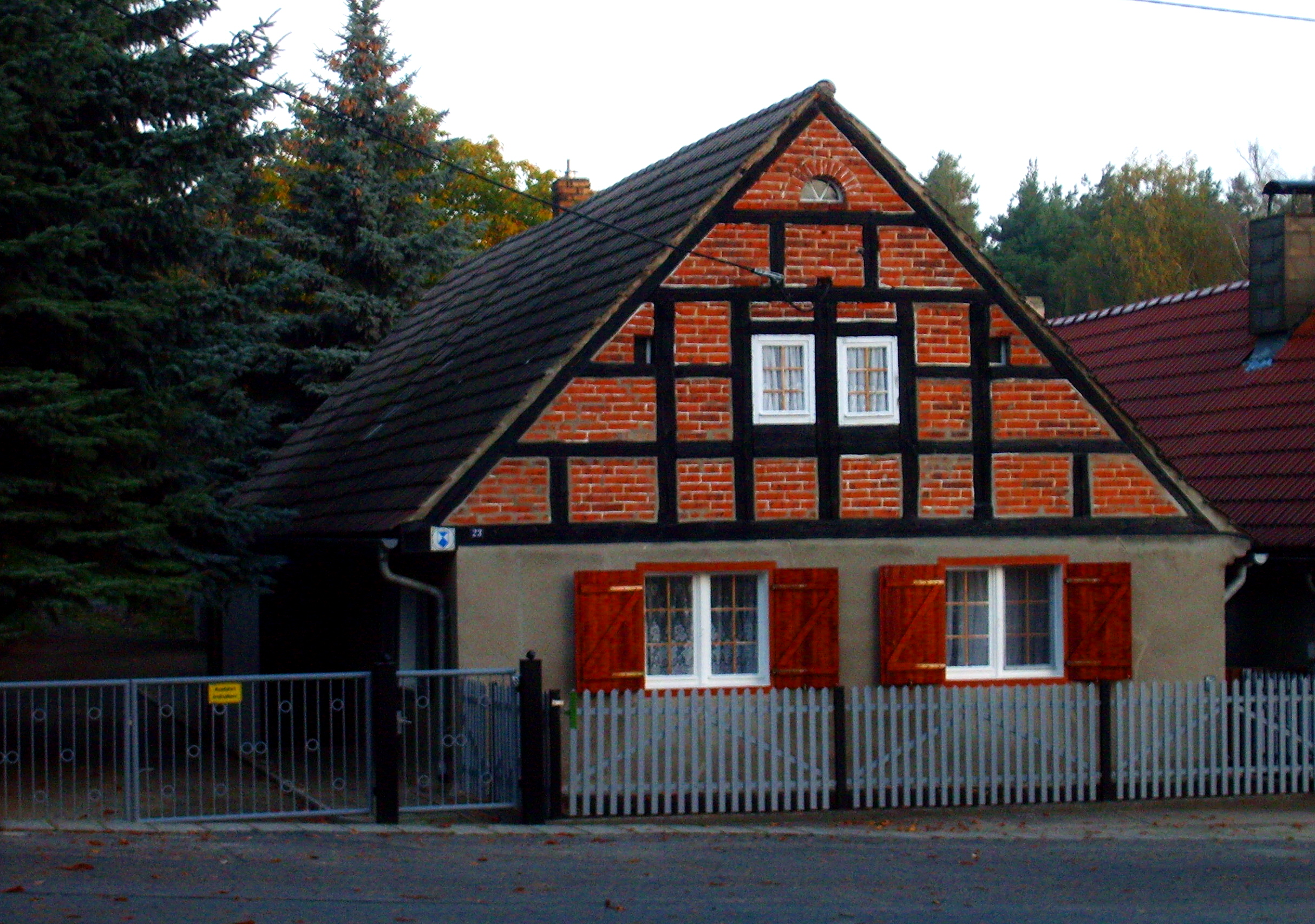 Baudenkmal in Kraupa.